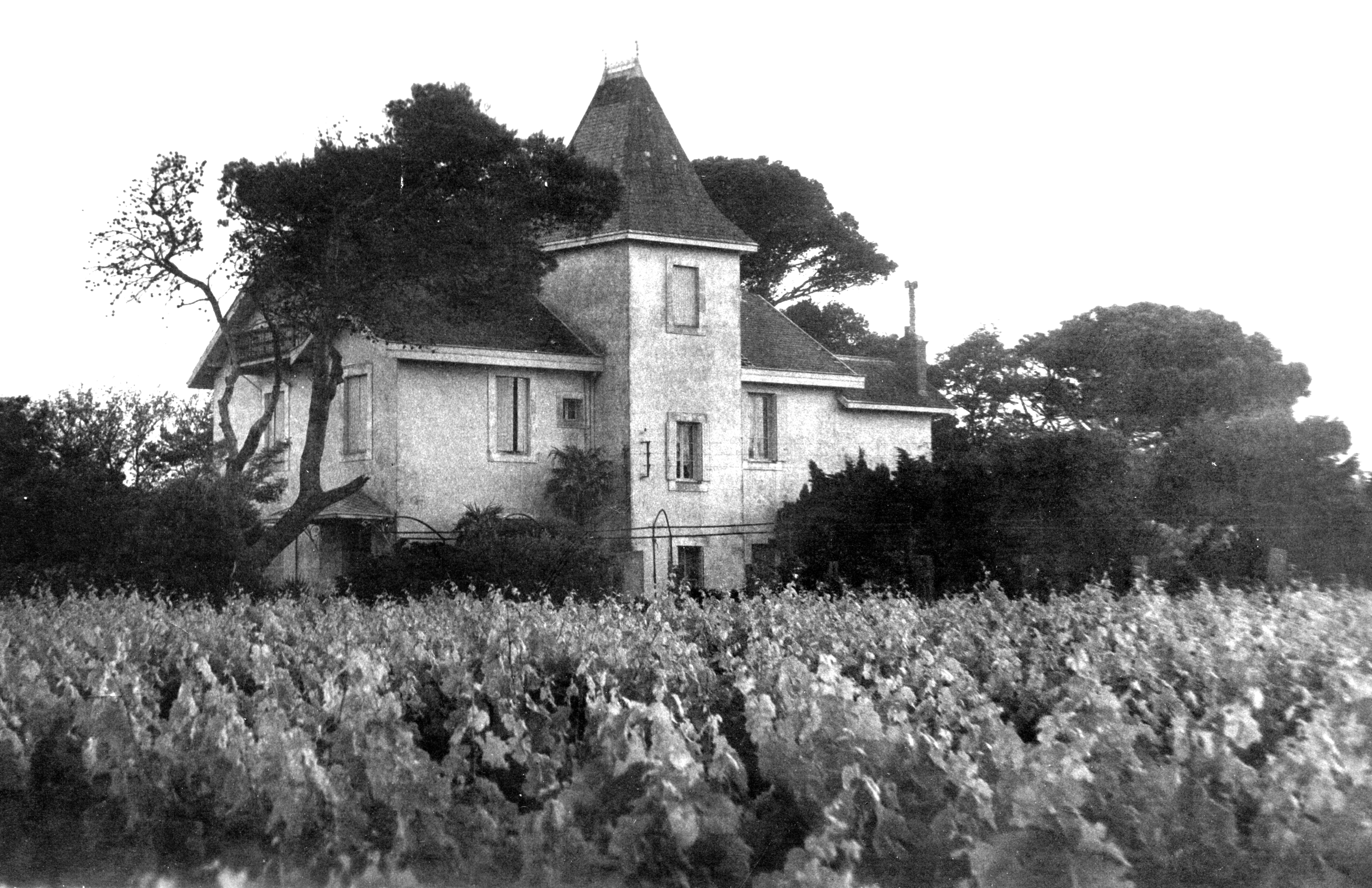 Le Chateau dans les vignes aux Cabanes de Fleury 1975